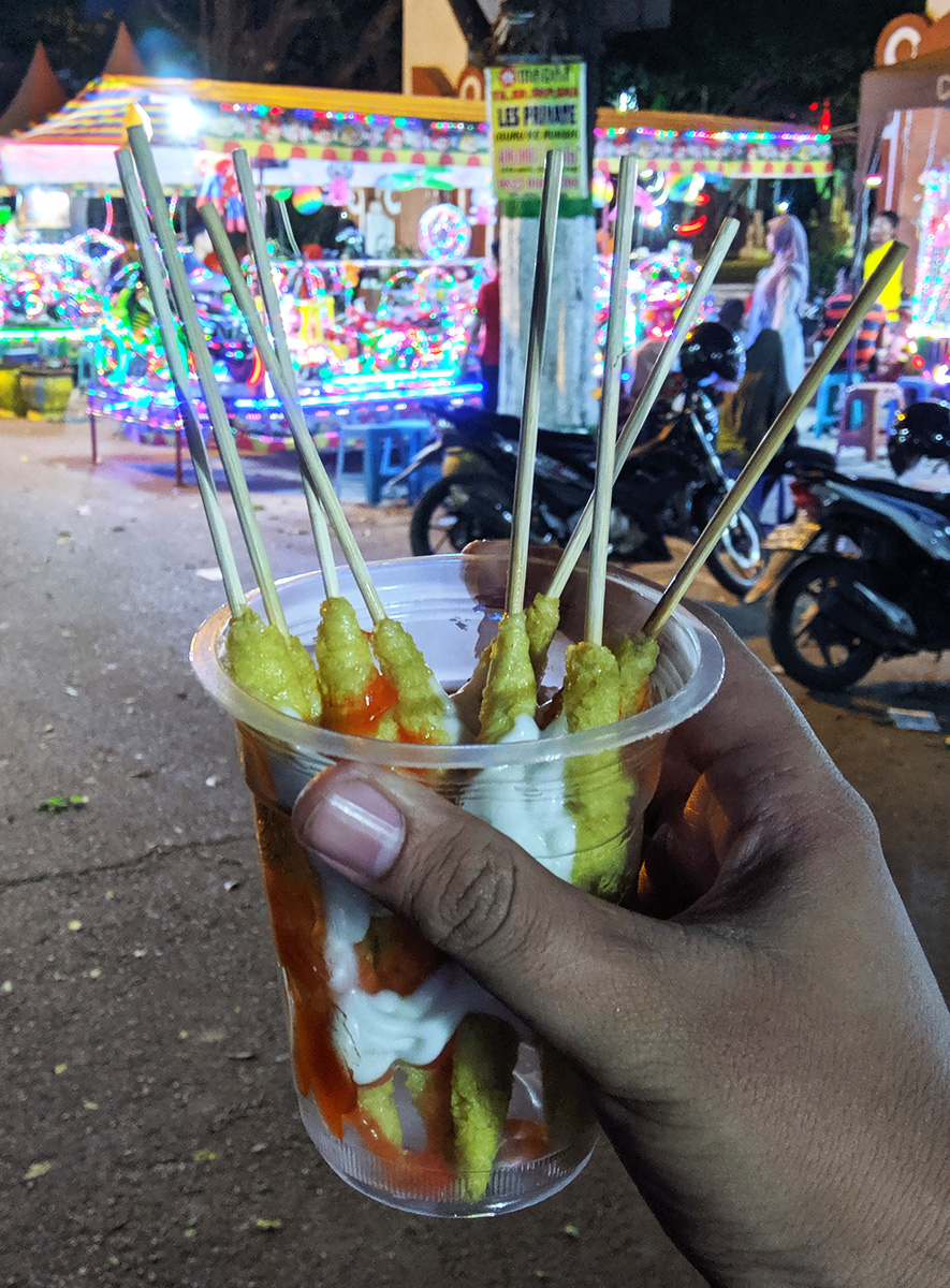 Sate telur gulung di alun-alun Nganjuk